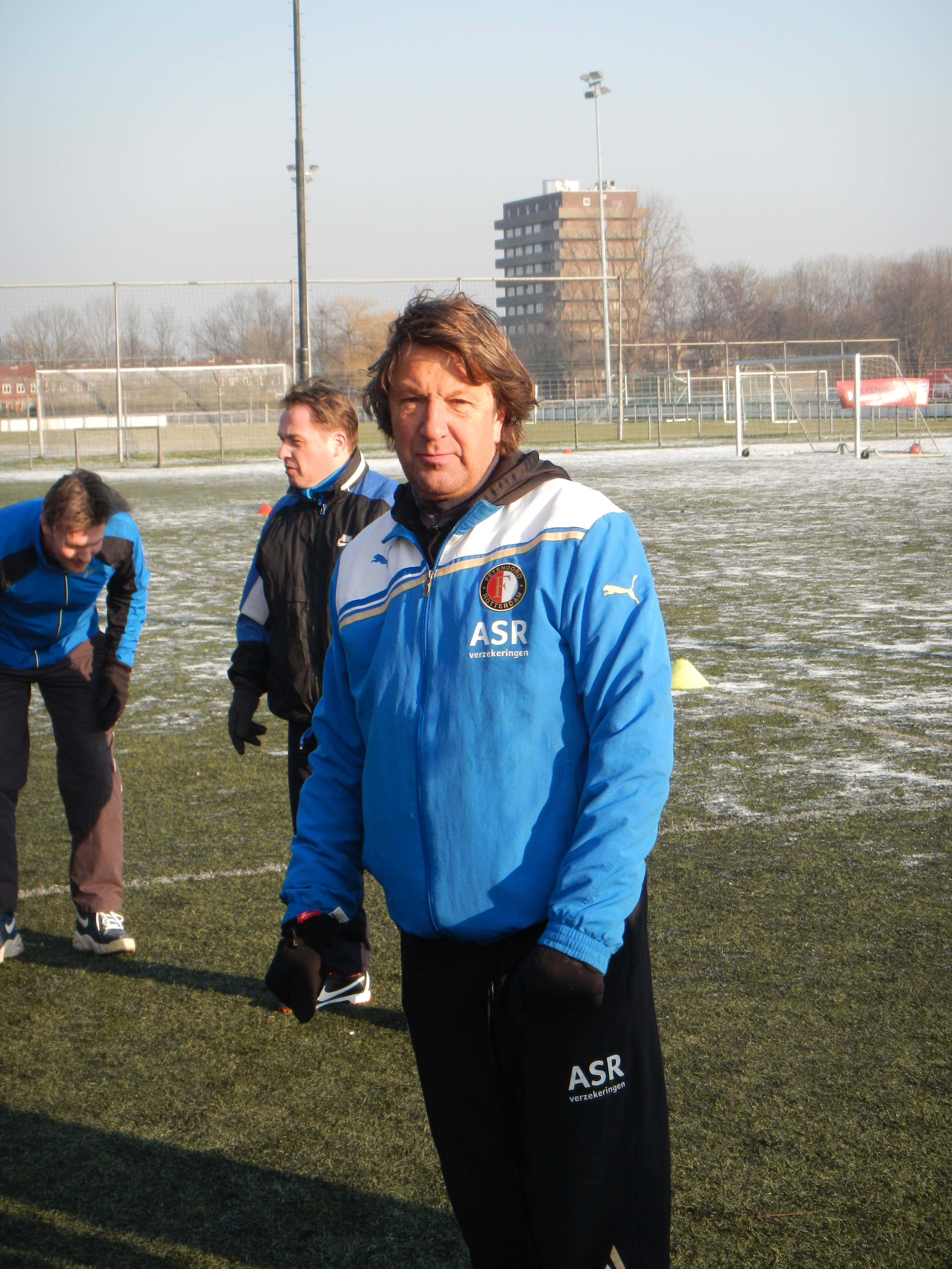 Ben Wijnstekers tijdens een voetbalclinic op Varkenoord in Rotterdam